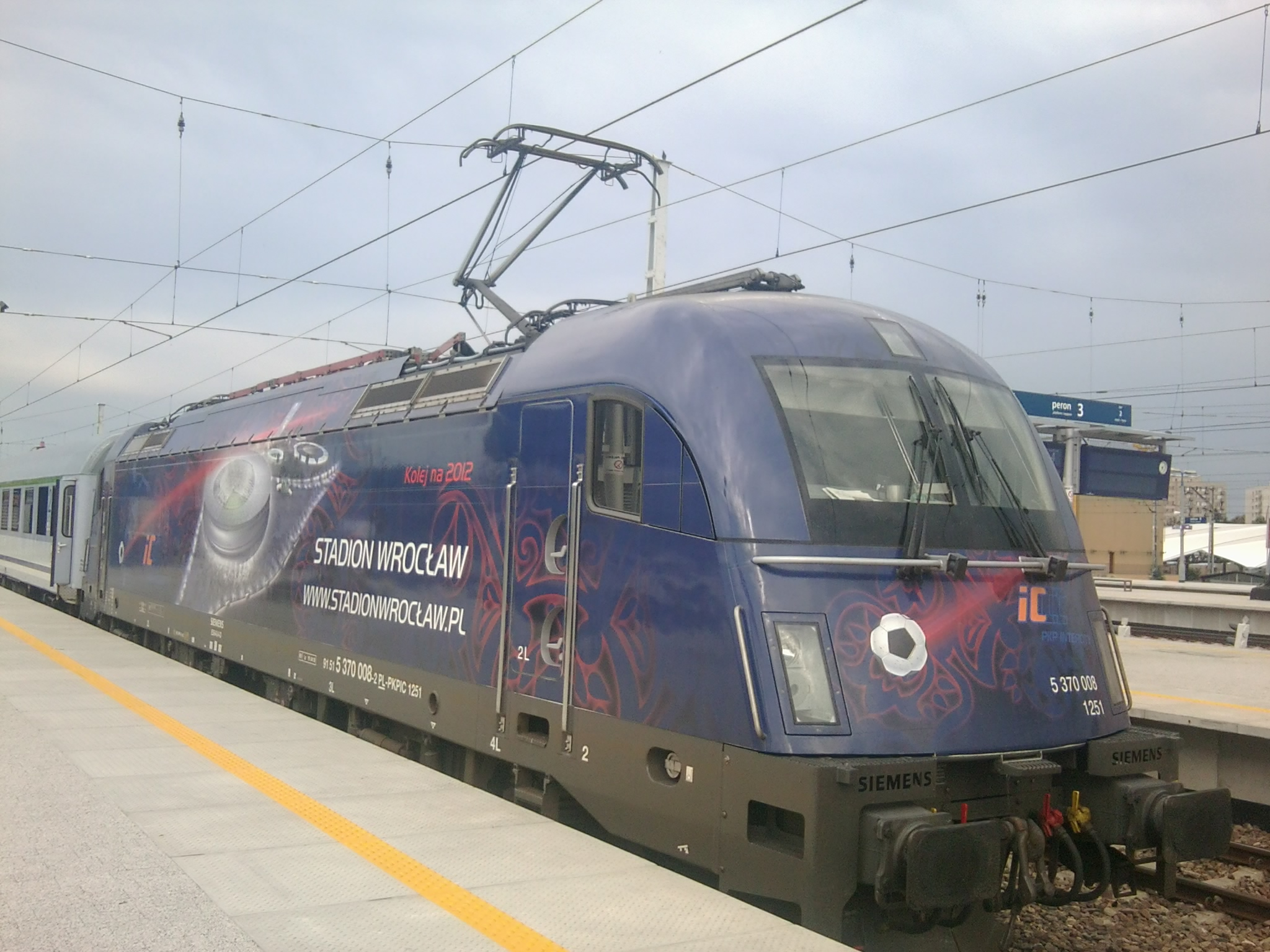 Lokomotywa EU44 oklejona w barwy stadionu miejskiego we Wrocławiu na czas trwania EURO 2012.